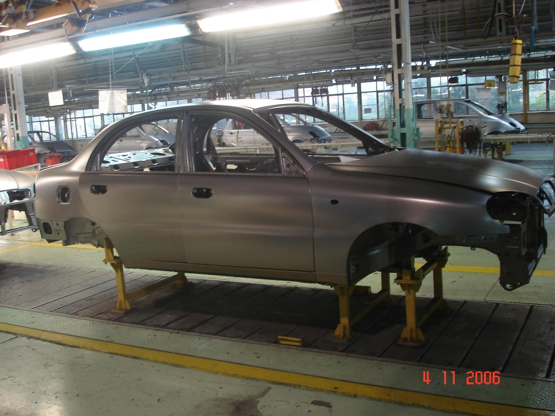 Linia montażowa FSO Lanosa i FSO Matiza w Fabryce Samochodów Osobowych w 2006 roku.